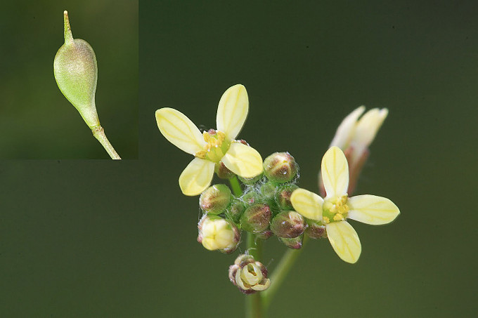 Camelina microcarpa